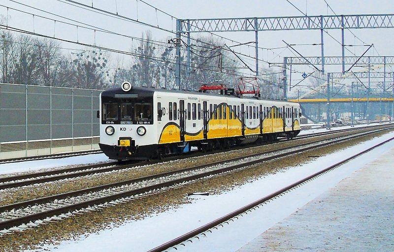 Elektryczny zespół trakcyjny EN57-1703, należący do Kolei Dolnośląskich i nazwany Endolino, przejeżdża przez stację w Grodzisku Mazowieckim jako pociąg służbowy PXJ 164000/1 z Mińska Mazowieckiego do Legnicy po ukończonej 29 grudnia 2016 naprawie rewizyjnej z modernizacją.